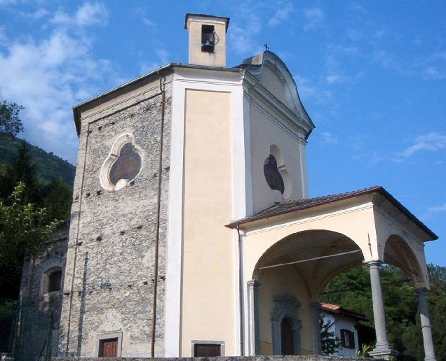 Chiesa della Madonna della Pietà a Cecino (SO) - Italy